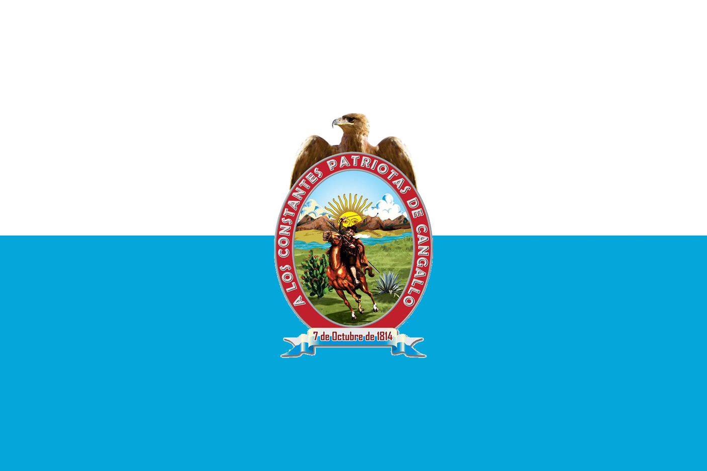 Cangallo, Ayacucho, Perú